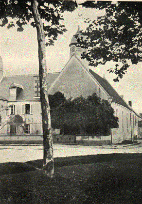 Le temple d'Asnières-lès-Bourges, ville natale du missionnaire français François Coillard.